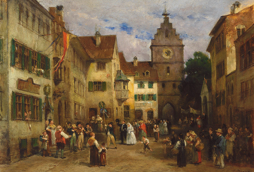 Belebte Straße mit Hochzeitsgesellschaft vor dem Franziskanertor in Überlingen am Bodensee; Öl auf Holz 33,5 x 48 cm